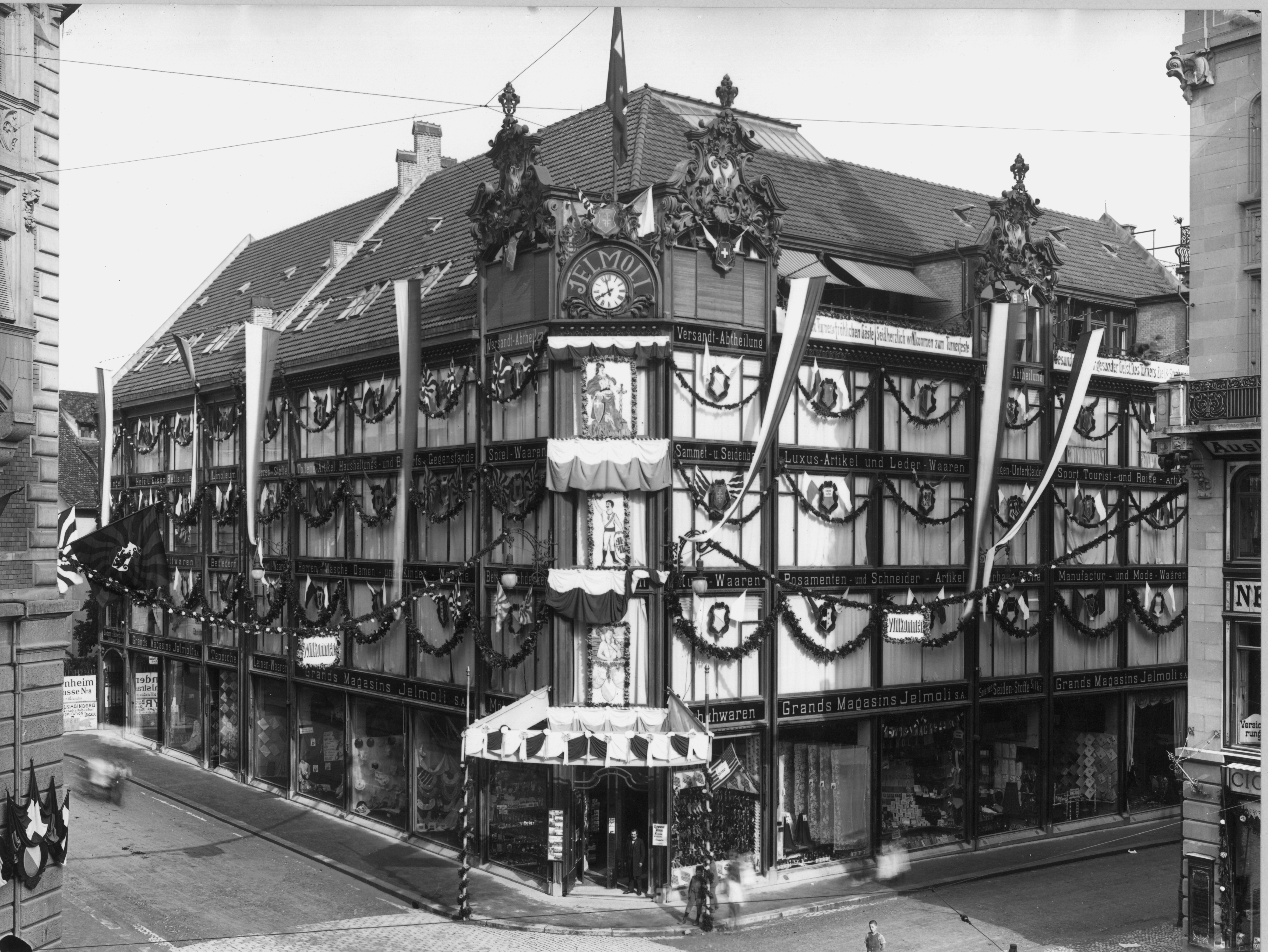 Jelmoli, Zürich, Schweiz, 1903